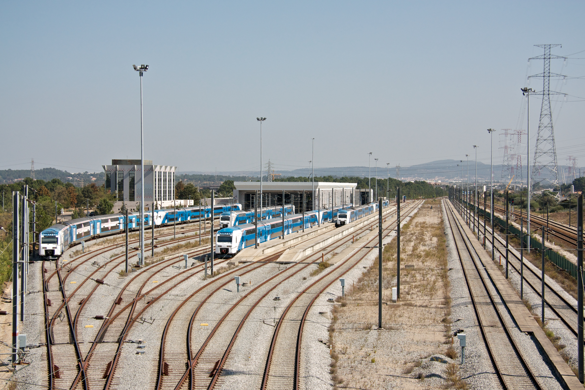 Tipo: EC [ Estação de Concentração ] Local: Lisboa [Linha do Sul , PK 21] Data e hora: 21 de Setembro de 2011 [15h16]